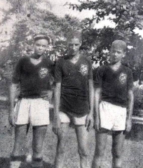 Nilton Santos, ex-jogador do Botafogo no Flexeiras Atlético Clube, clube que foi revelado, em 1939. Nilton Santos é o primeiro da esquerda para a direita, ao lado dele estão os jogadores Feguinha e Binininha. Nilton Santos tinha 14 anos na época